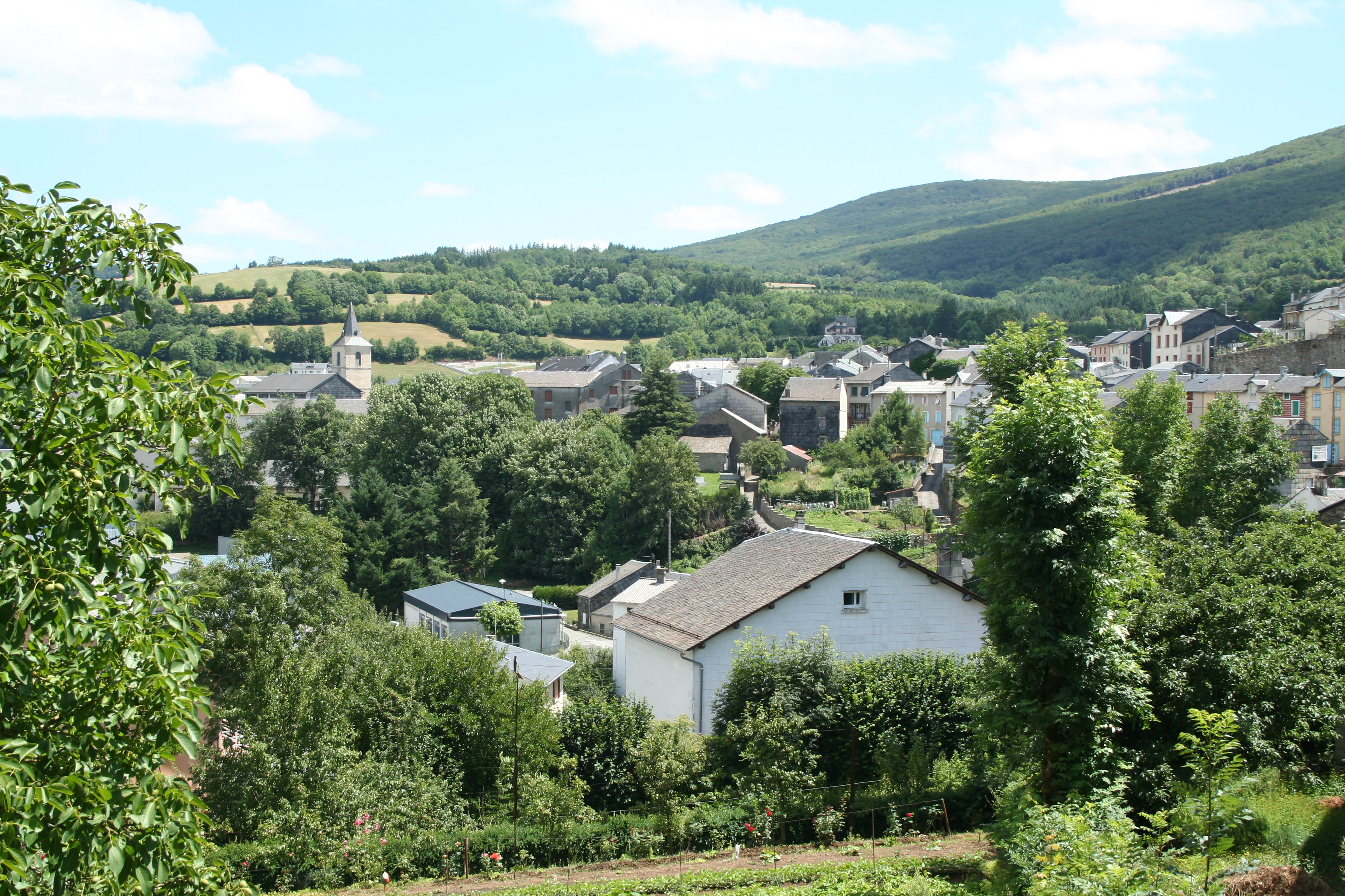 Viane (Tarn) - vue générale.